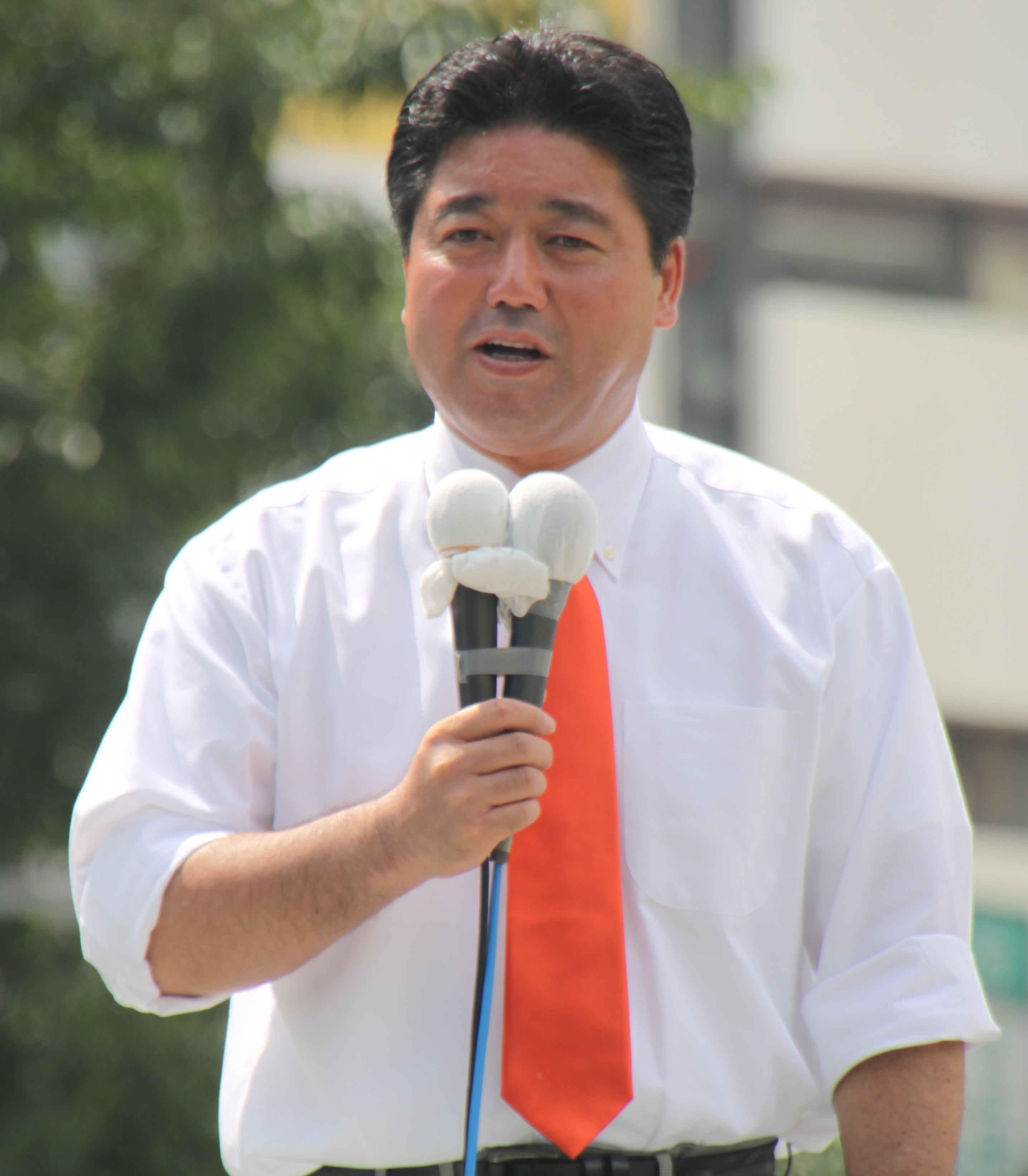 Mikio Shimoji、下地幹郎